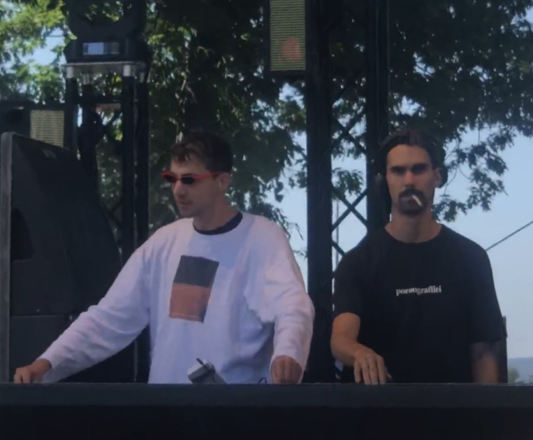 FJAAK beim WET Festival in Sindelfingen am 31.08.2019.